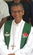 Pdt. Gusti Made Alit Purya, M. Min